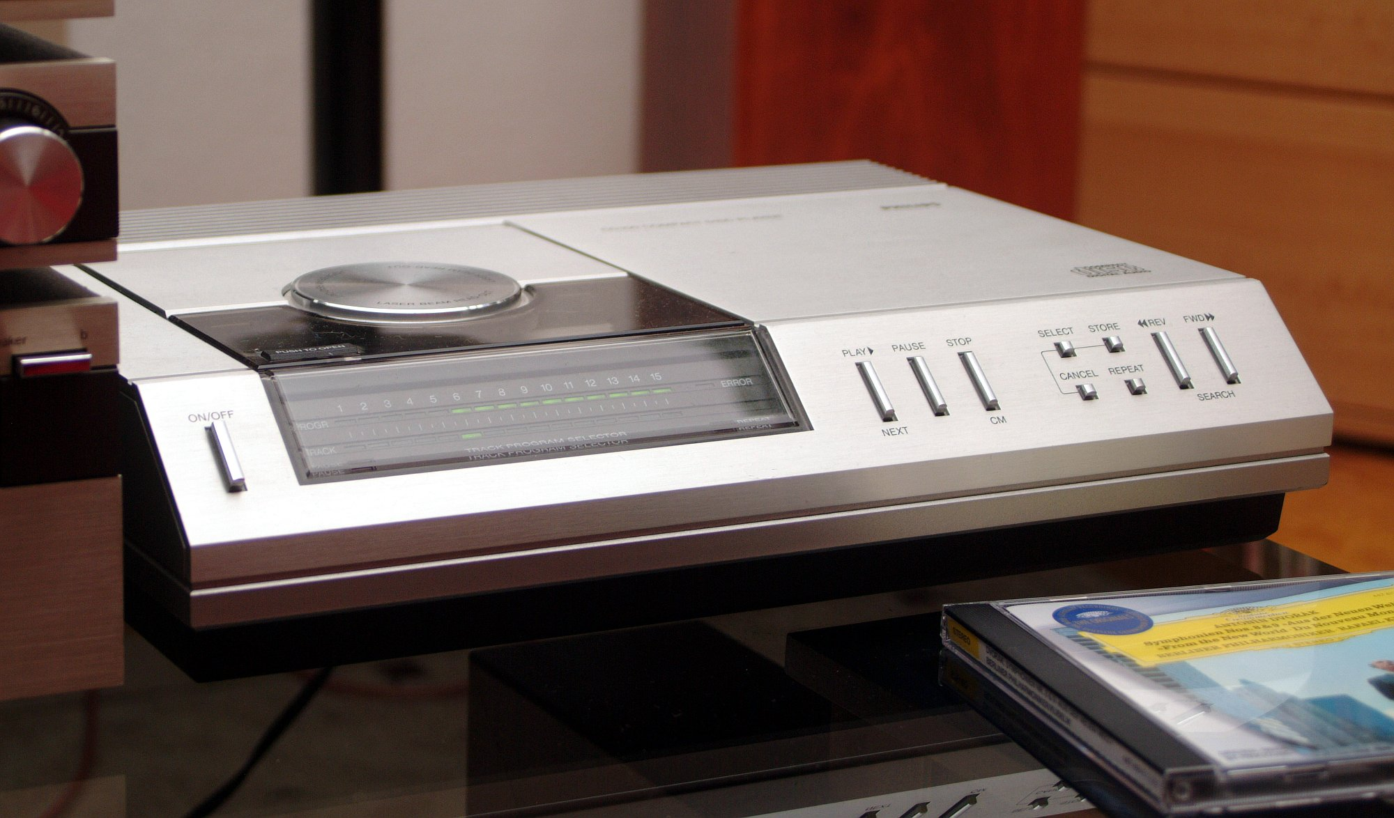 CD-Spieler Philips CD 100, 1982